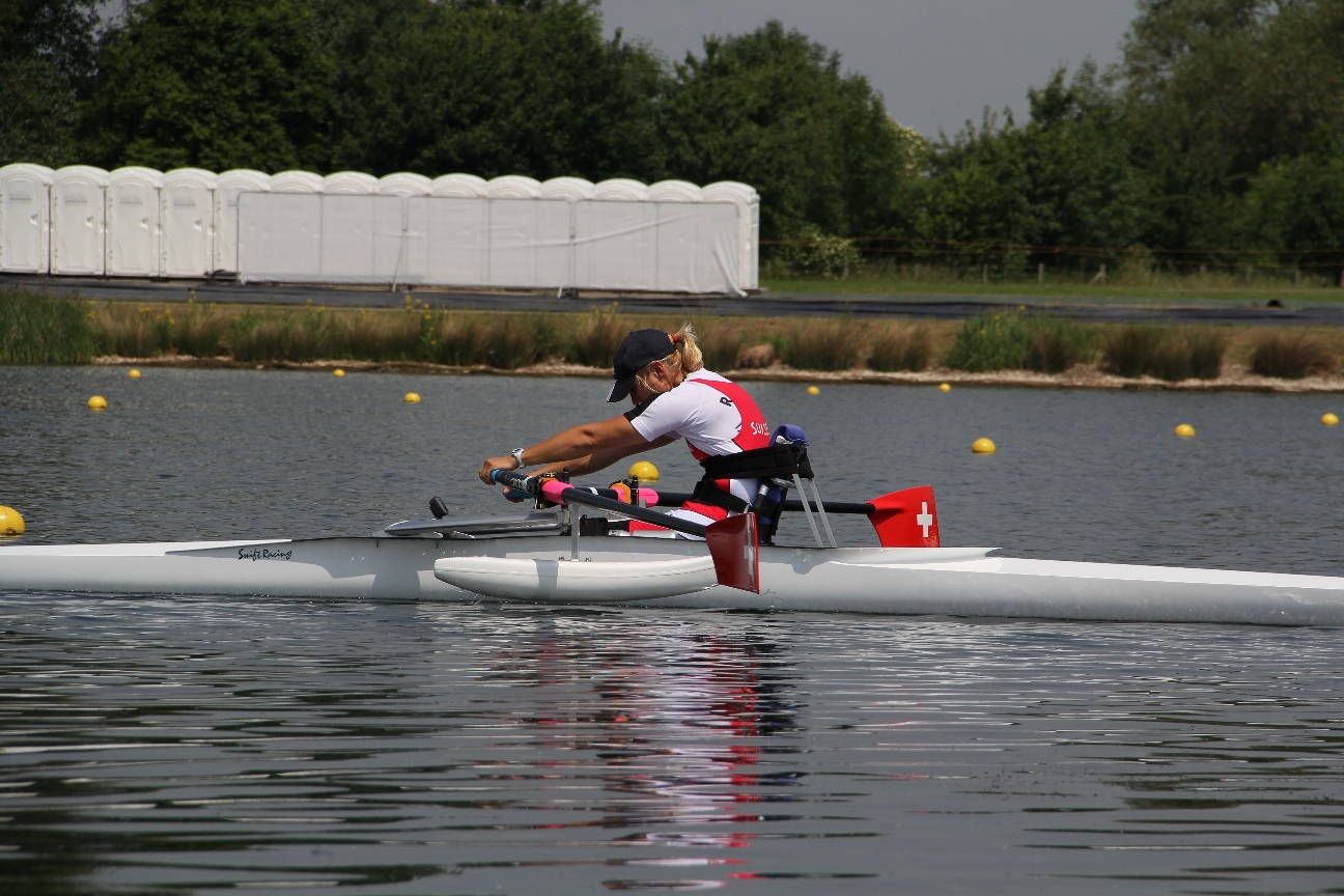 World Cup ll, Olympiastrecke Eton (GBR)